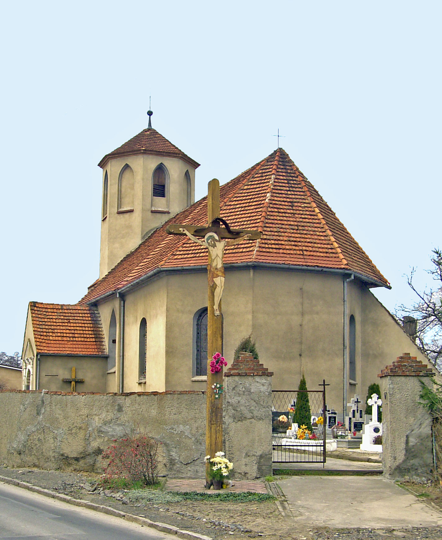 Brzeg Dolny Warzyń, ul. Naborowska - kościół pomocniczy p.w. Wszystkich Świętych (zabytek nr A/2668/1187 z dn. 10.12.1964)